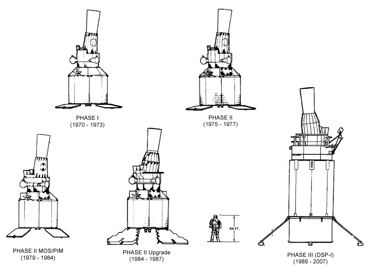 DSP (Defense Support Program) - Different Generations